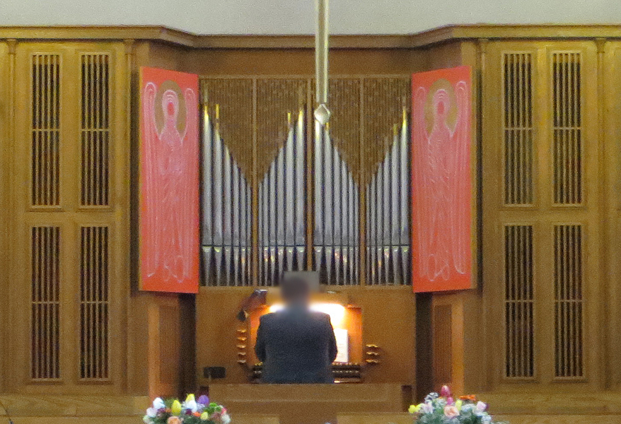 Orgel der evangelischen Christuskirche, Dudweiler, Stadt Saarbrücken, Saarland